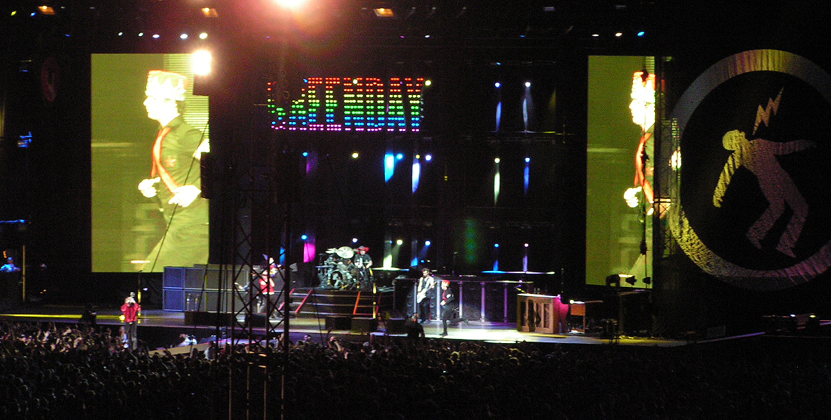 da flickr